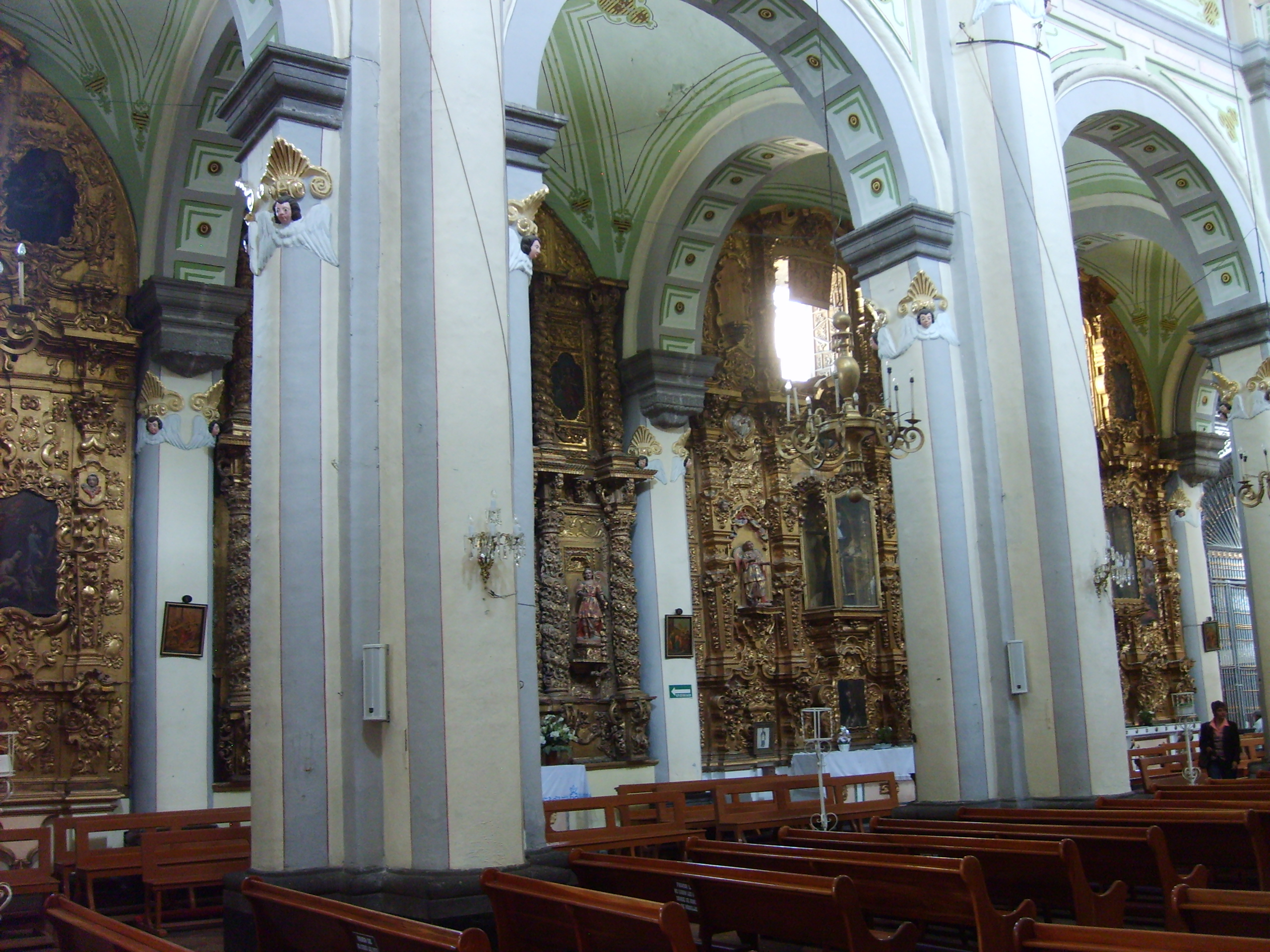 Vista desde la nave derecha de la Parroquia de San José, en Puebla